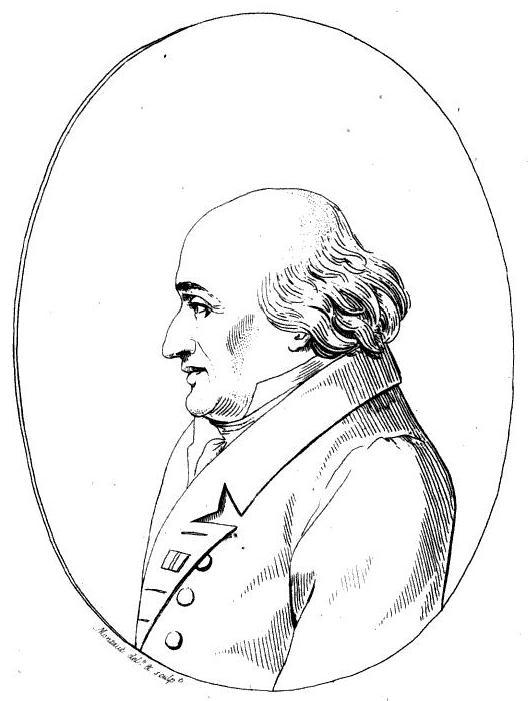 "Mr. le Comte Siméon"